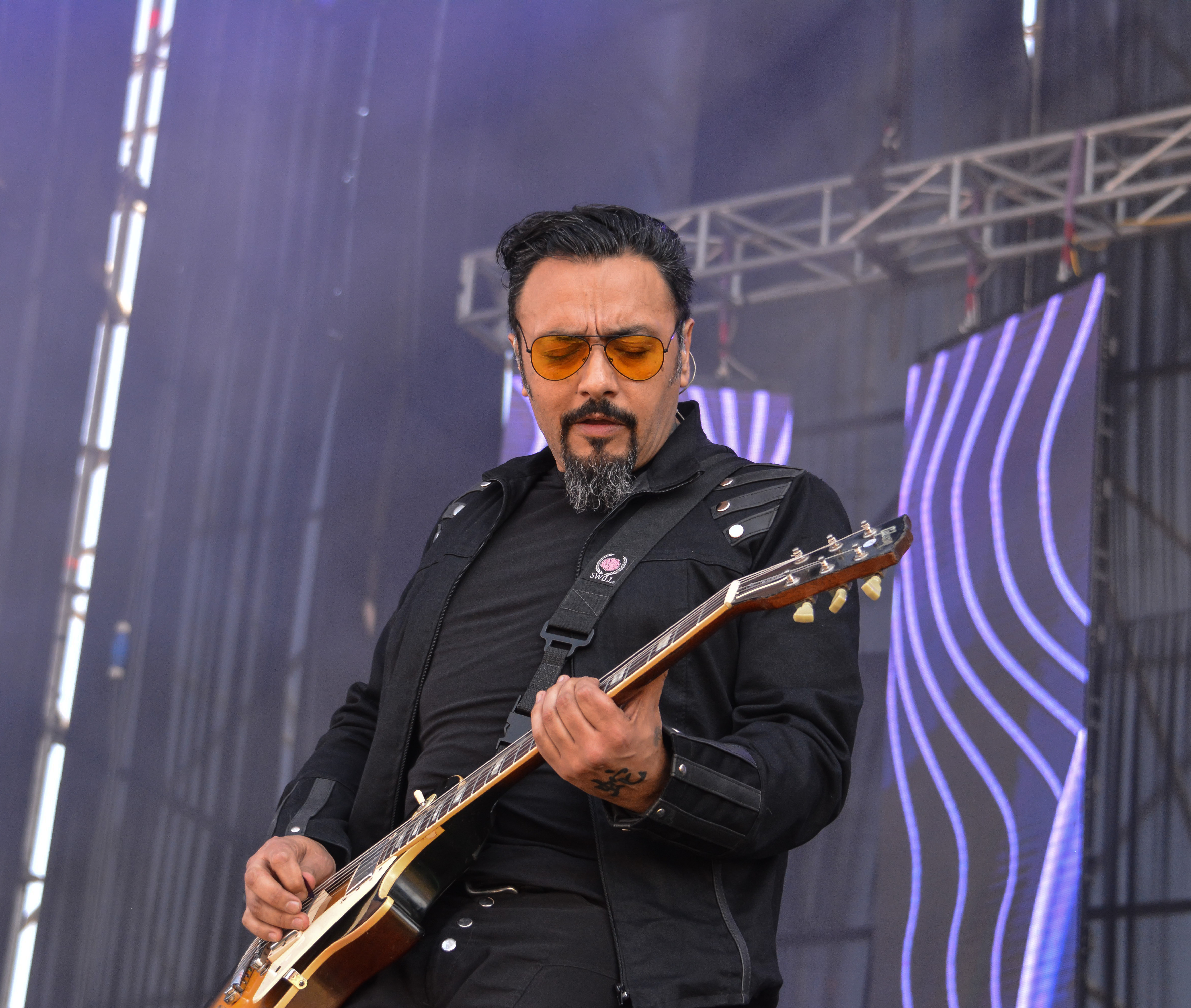 Claudio Valenzuela en la Cumbre del Rock Chileno 2018, Santiago, Chile